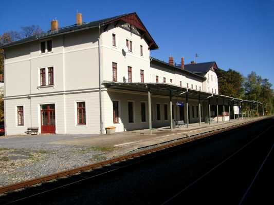 Bahnhof Sebnitz selbst erstellt und auf veröffentlicht